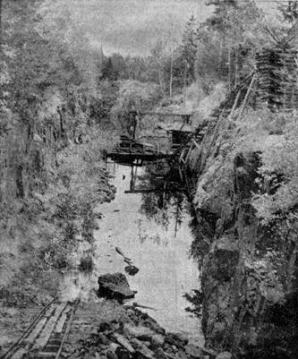 Stora Uttervik manganese mine, Södermanland county, Sweden